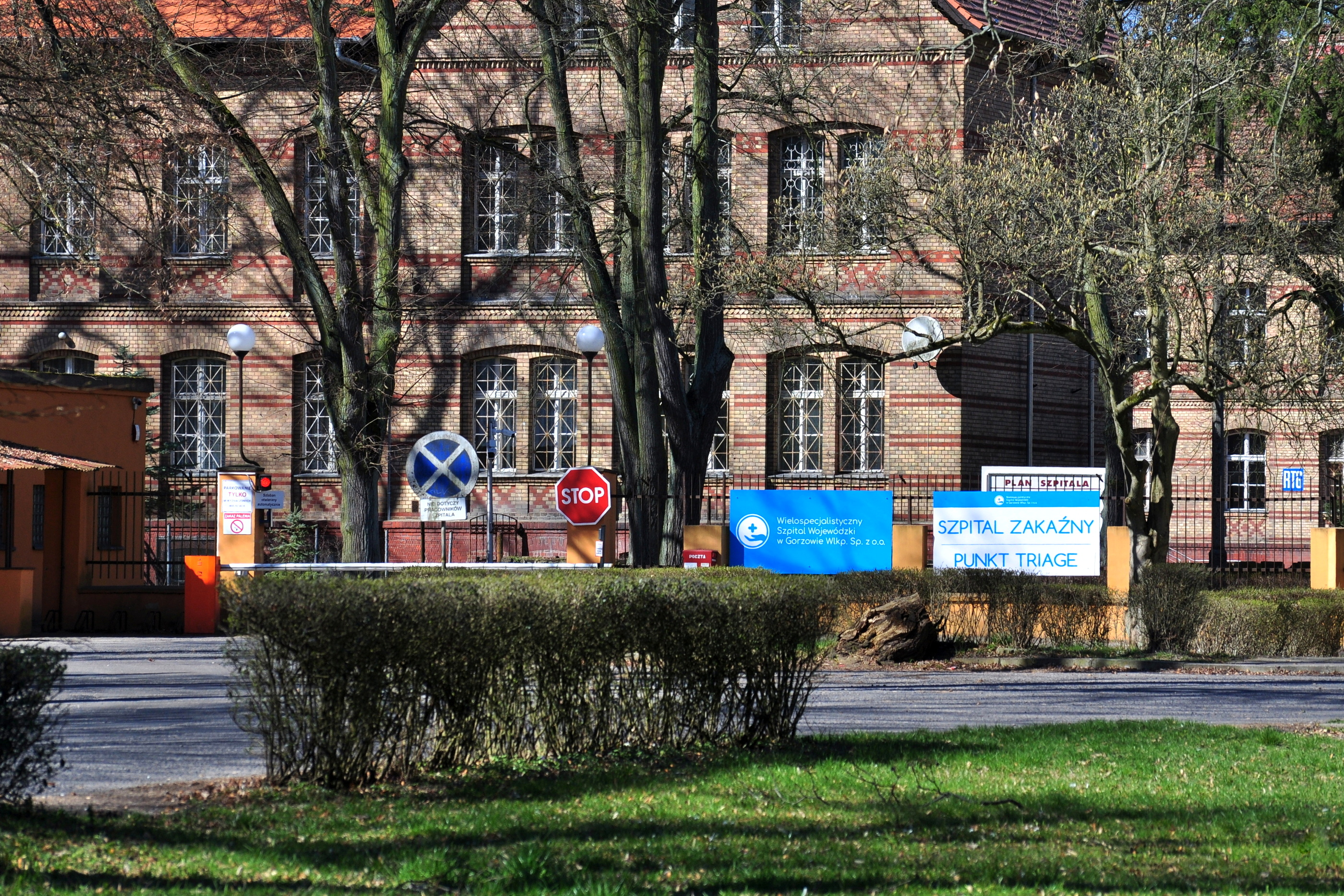 Pandemia wirusa SARS-CoV-2. Decyzją Ministra Zdrowia 19 lecznic w kraju zostało przekształconych w szpitale jednoimienne zakaźne. Wśród nich jest Wielospecjalistyczny Szpital Wojewódzki w Gorzowie Wlkp., a szpital zakaźny powstał na bazie zespołu szpitalnego przy ul. Walczaka.